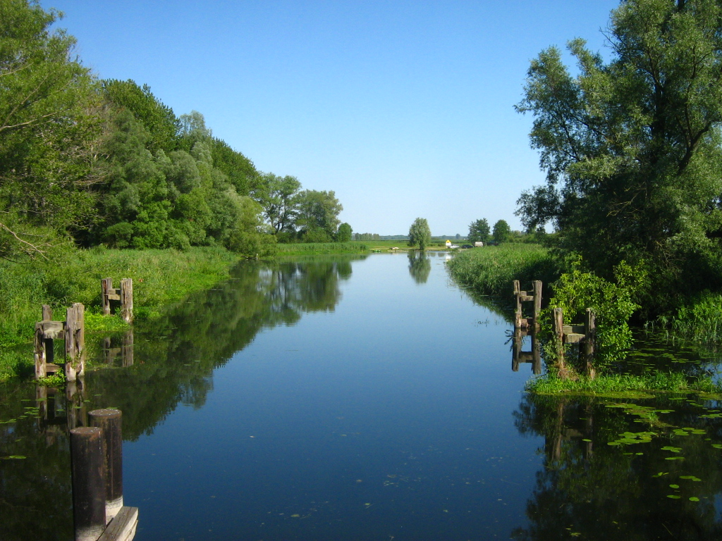 Blick auf die Trebel (flussabwärts) von der Klappbrücke in Nehringen.